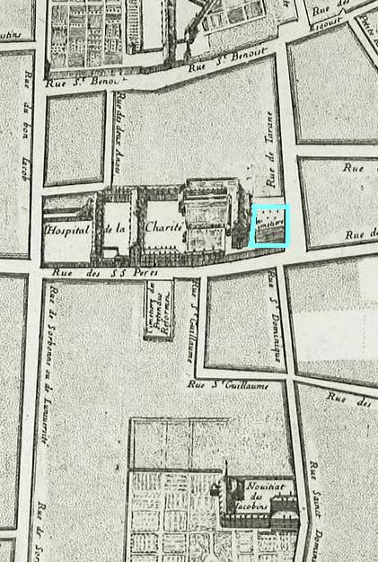 Emplacement du cimetière Saint-Germain